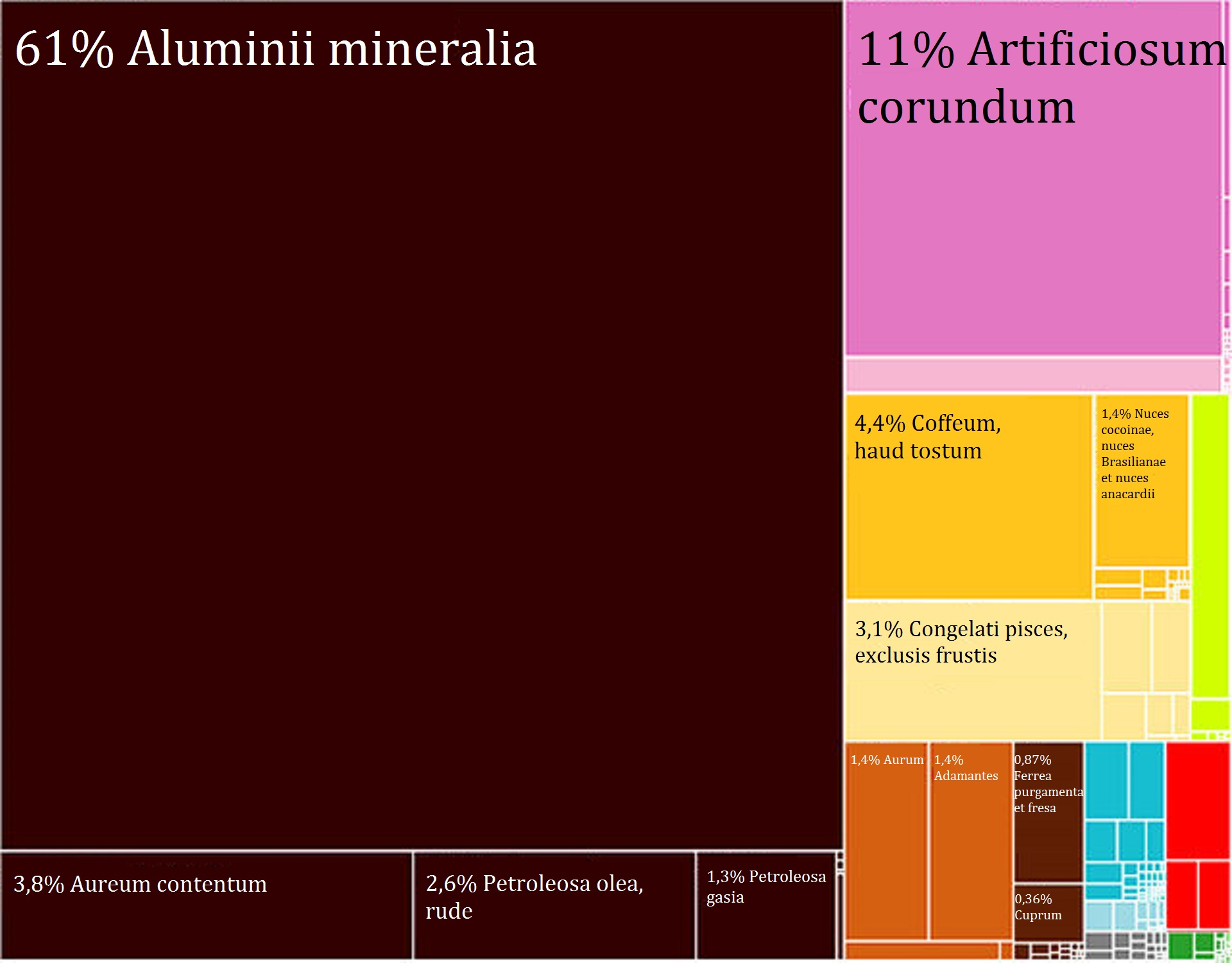 Proportionalis depictio exportatorum Guineensium productorum.